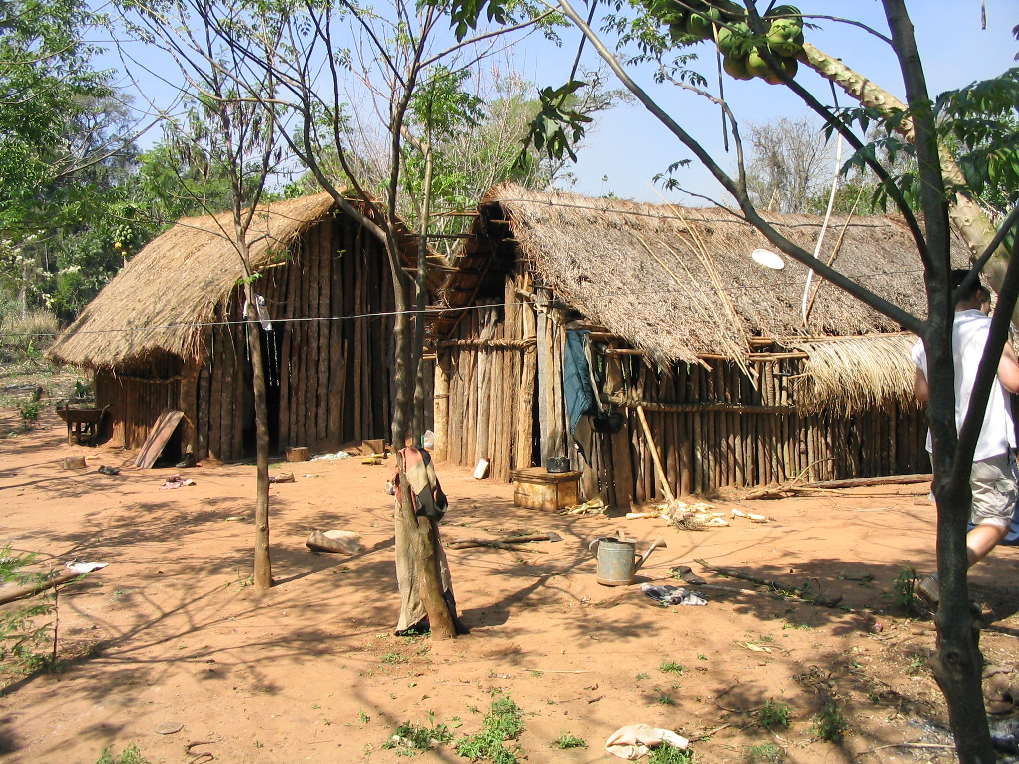 Tribo Indigena no Paraguai